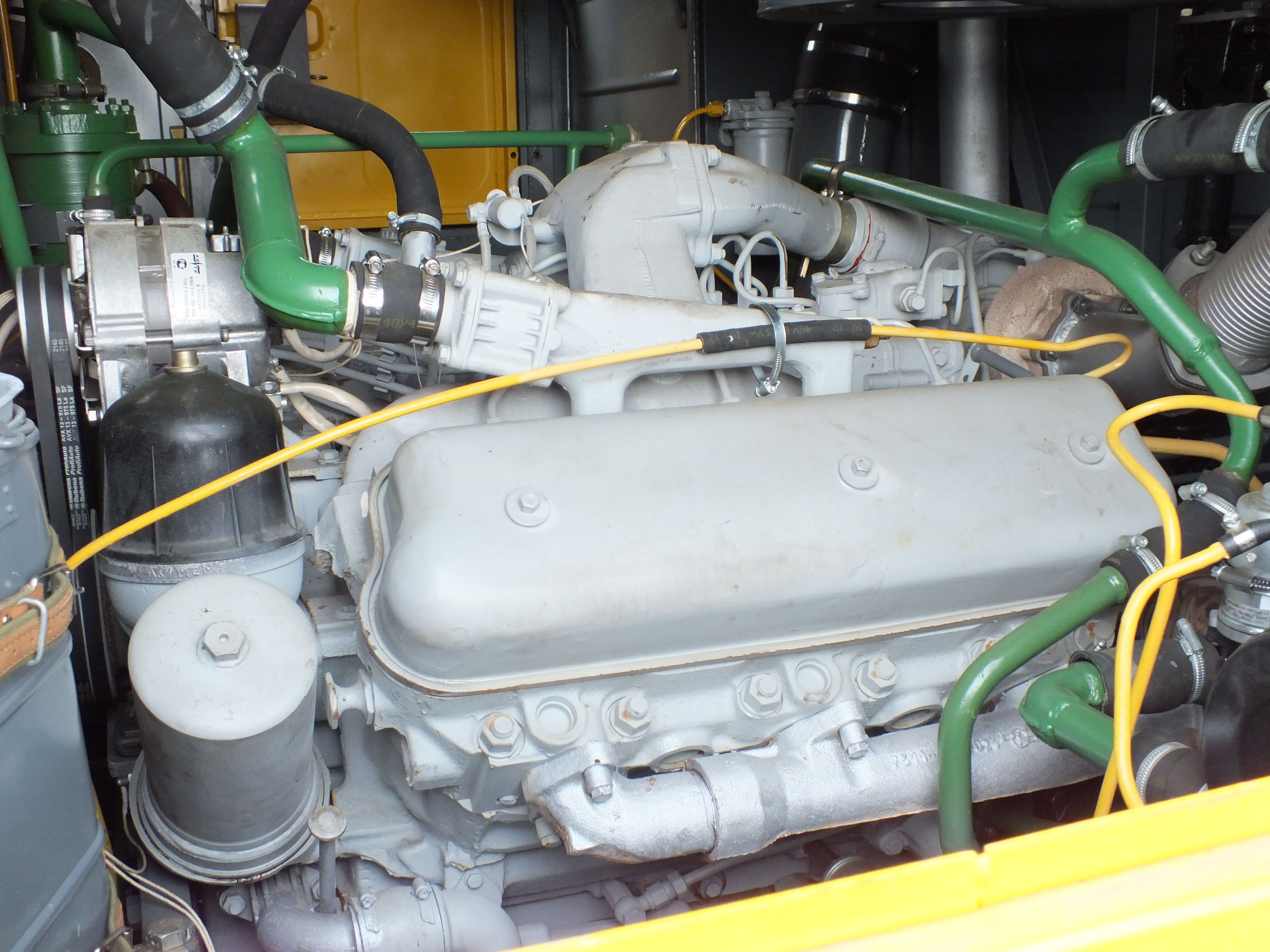 Плавающий вездеход ЧЕТРА дизель ЯМЗ-236